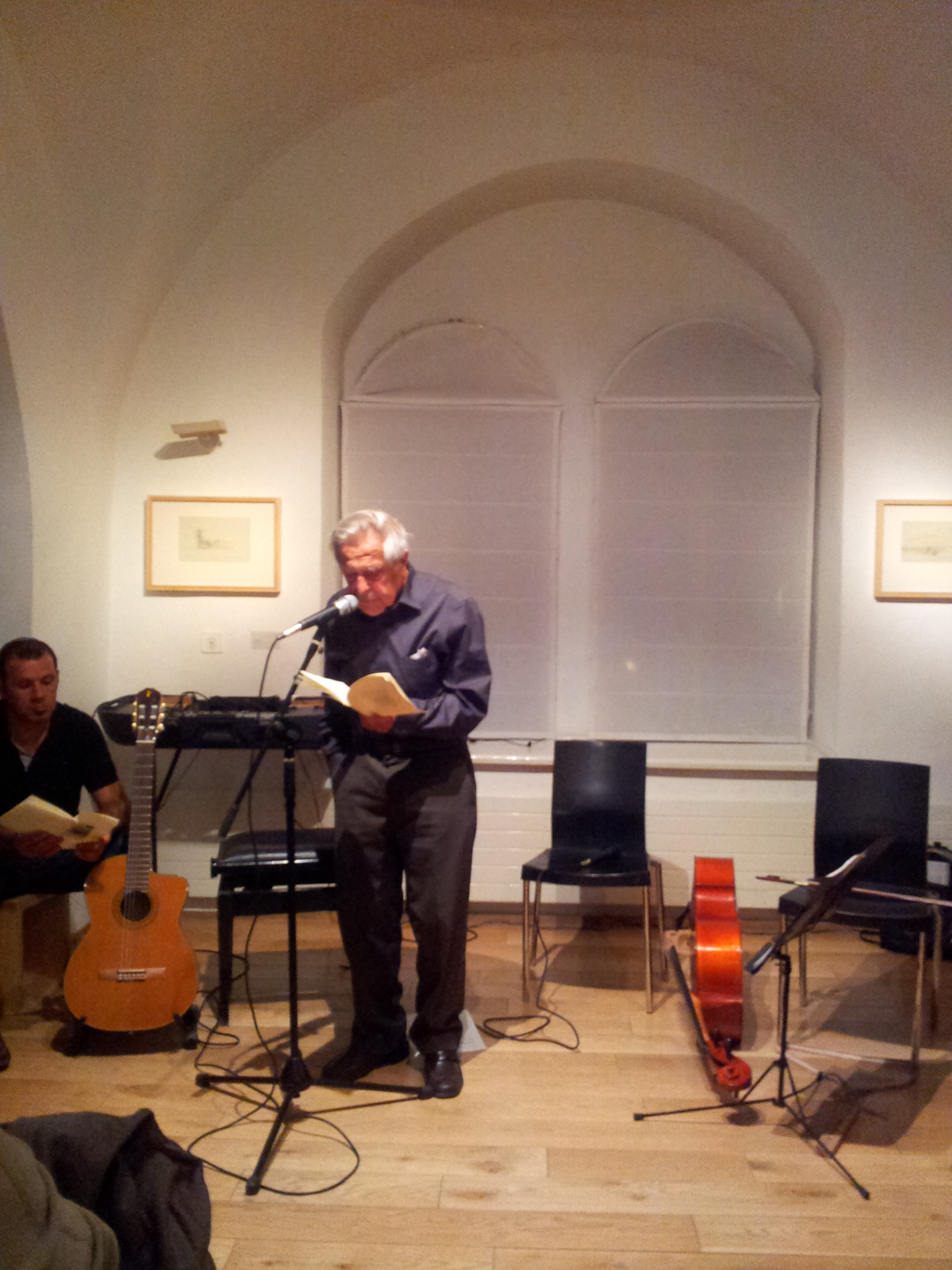 המשורר חיים גורי קורא את שירו "בדרך אל הים" בבית טיכו בירושלים ב-6 ביוני 2012